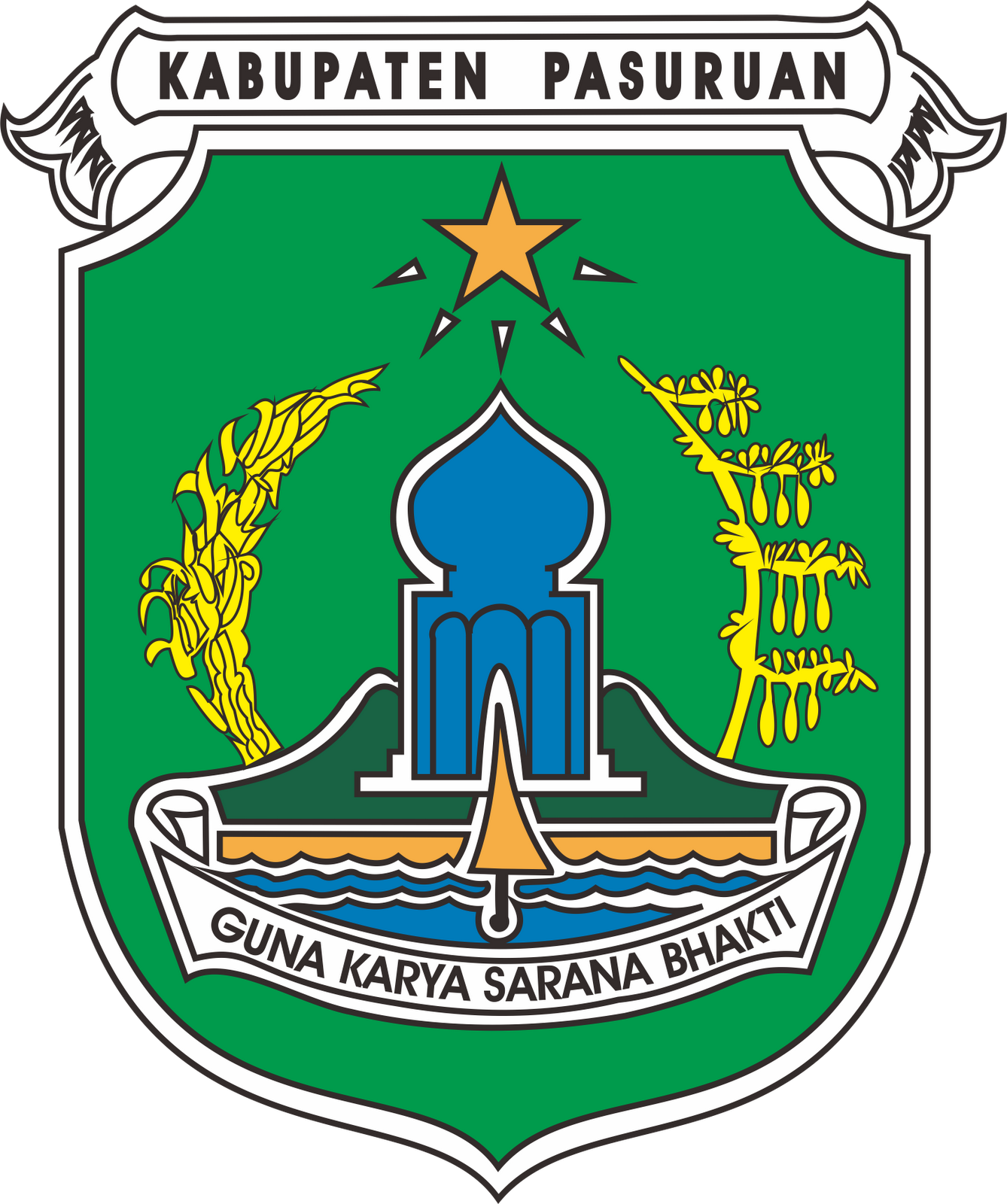 Lambang Kabupaten Pasuruan Licensing Kategori:Lambang kabupaten dan kota di Indonesia